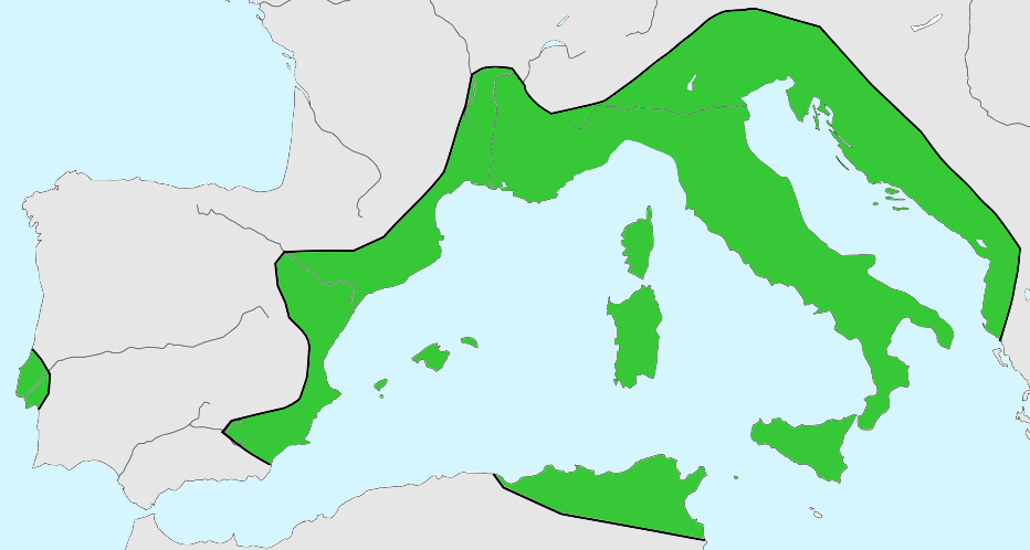 Extension de la cultura de la terralha cardiala.